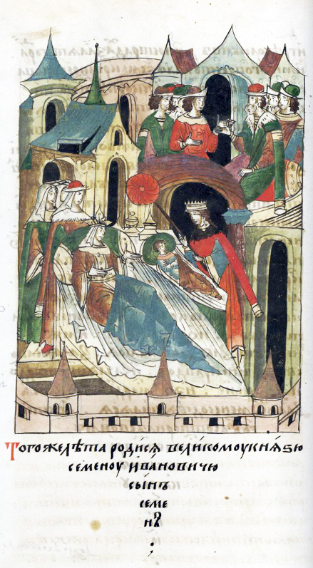 ЛИЦЕВОЙ ЛЕТОПИСНЫЙ СВОД В том же году у великого князя Семена Ивановича родился сын Семен.